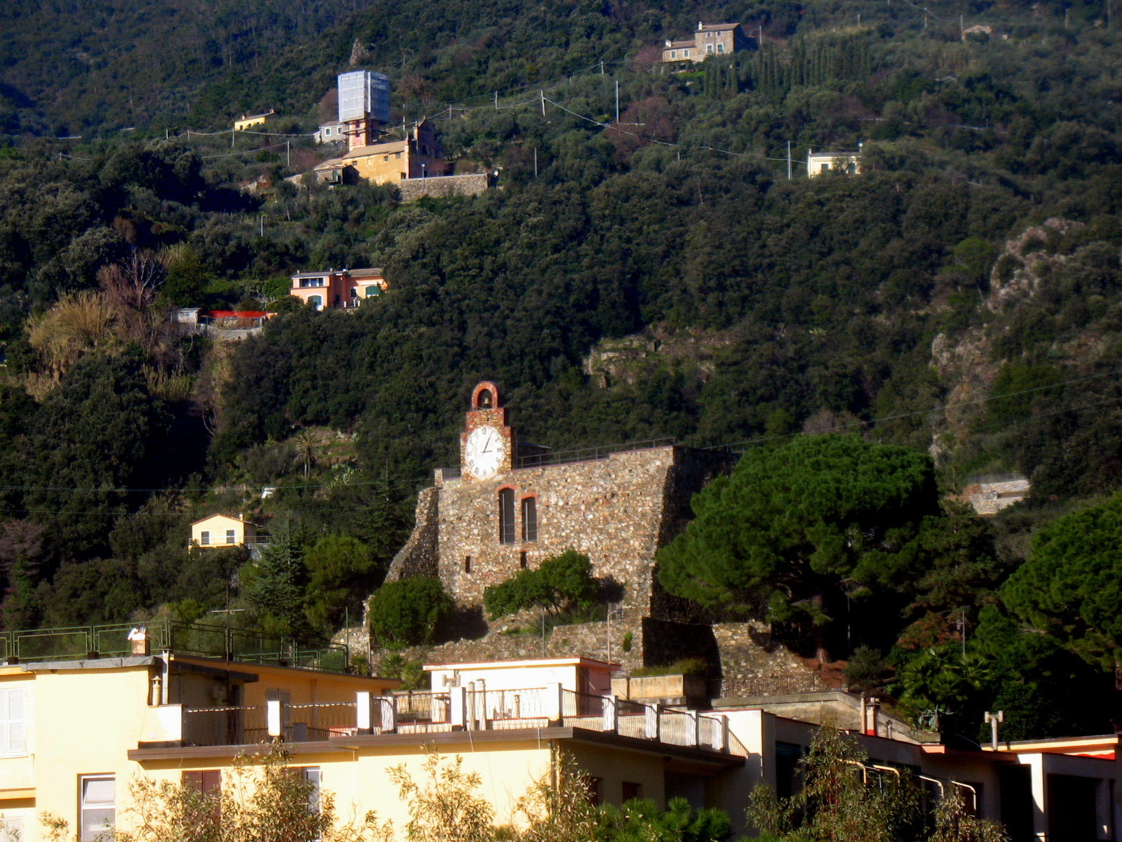 Castello di Bonassola